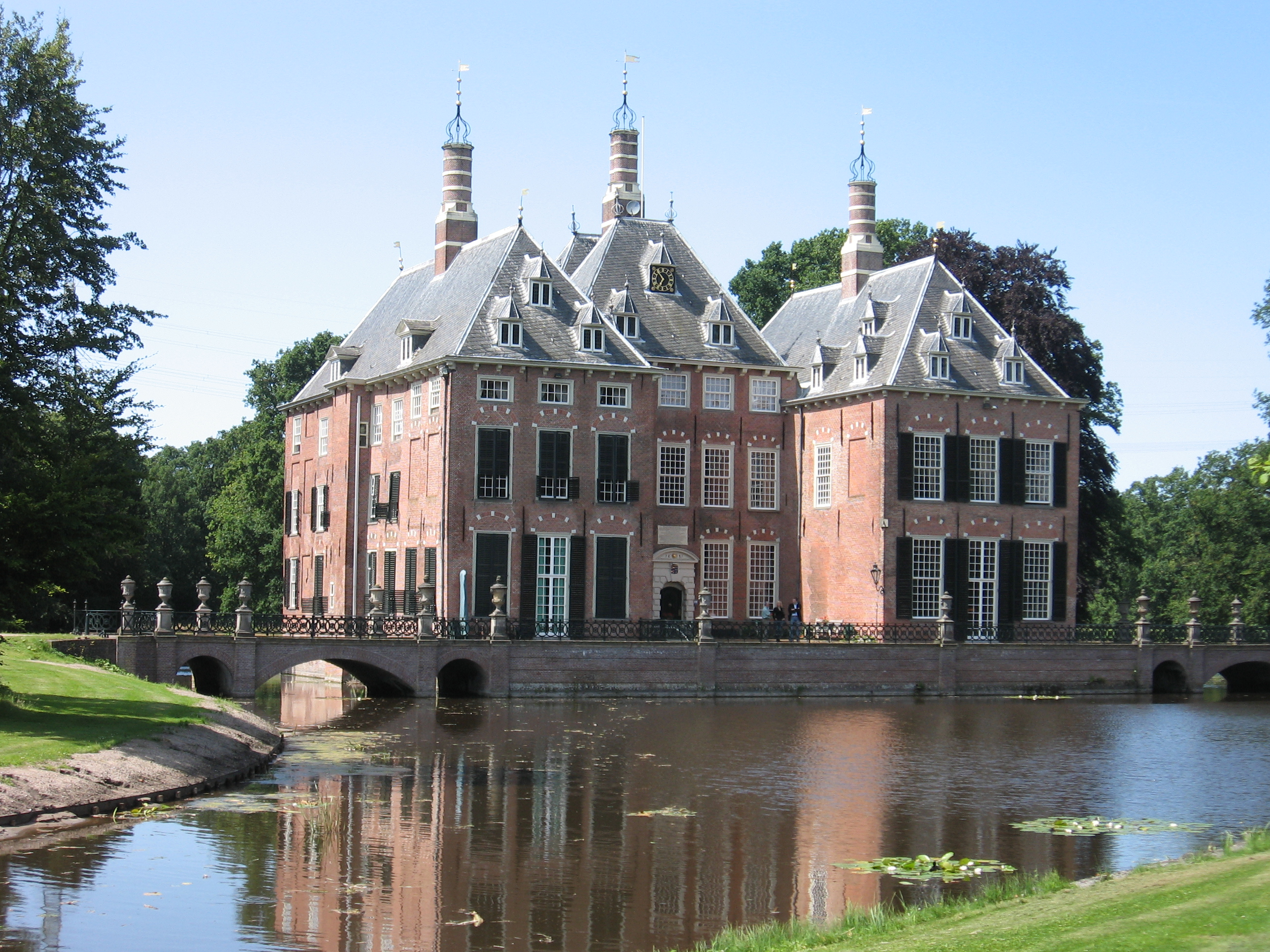 Kasteel Duivenvoorde, Voorschoten